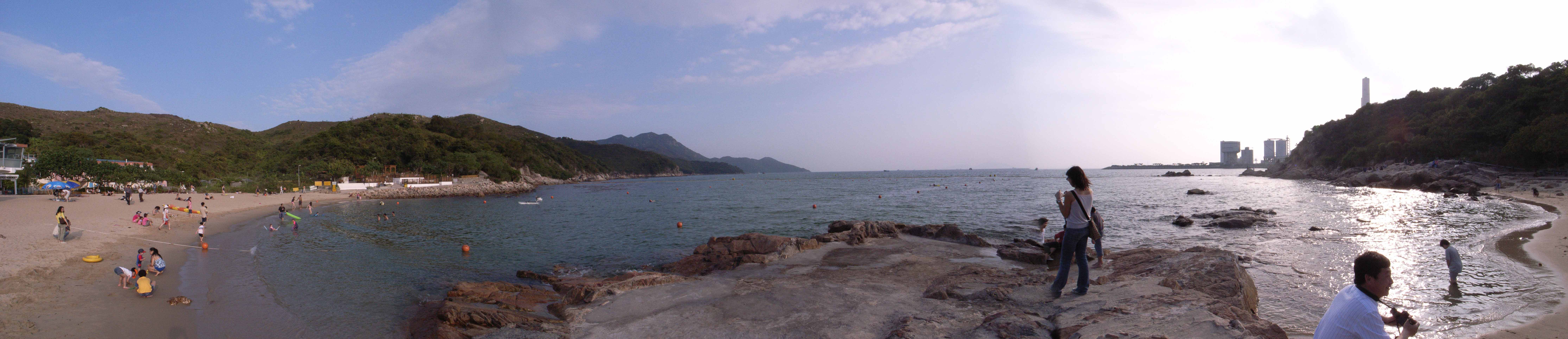 洪聖爺海灘 Lamma Island, Hong Kong